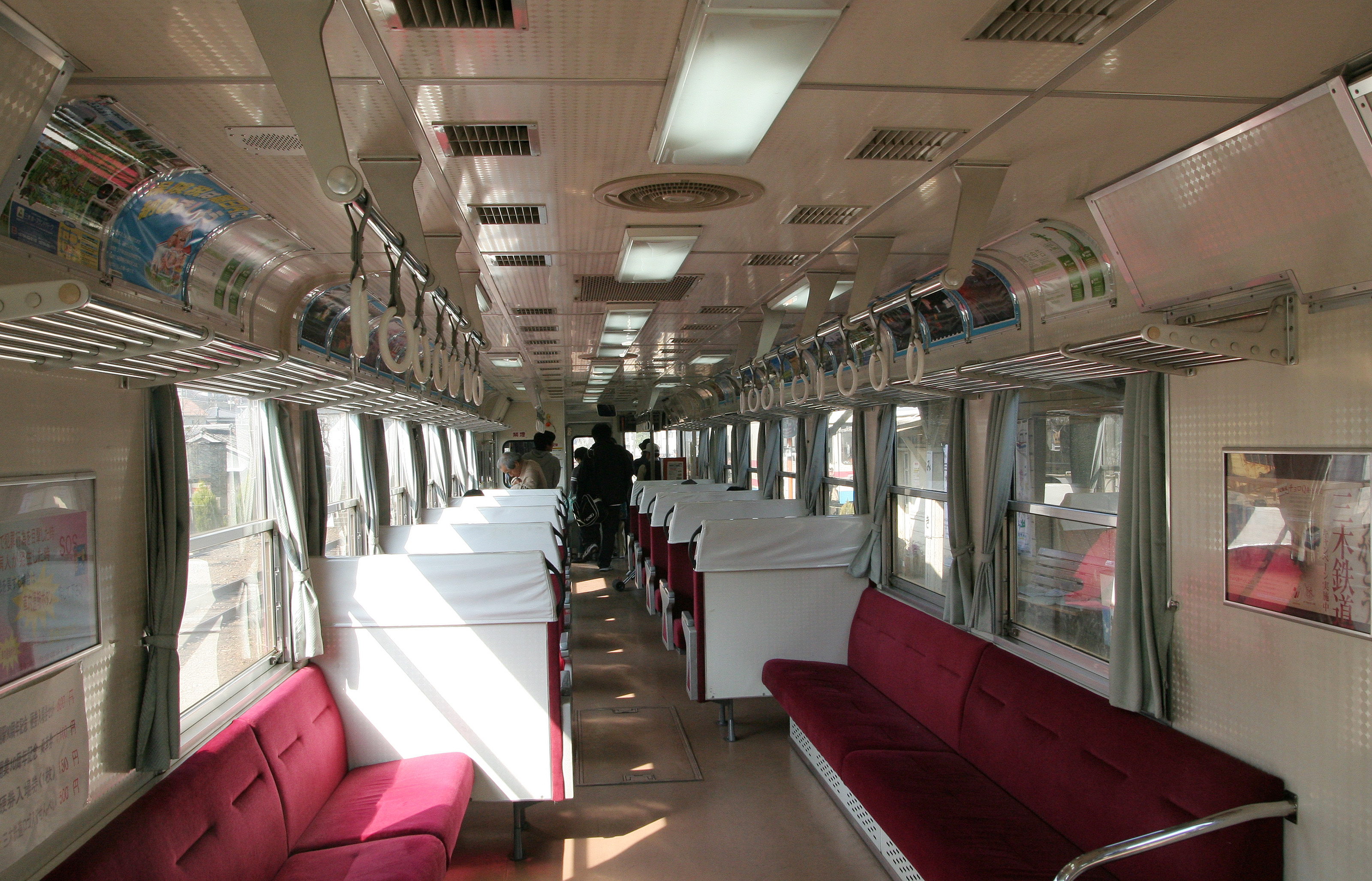 三木鉄道ミキ300形気動車104の車内